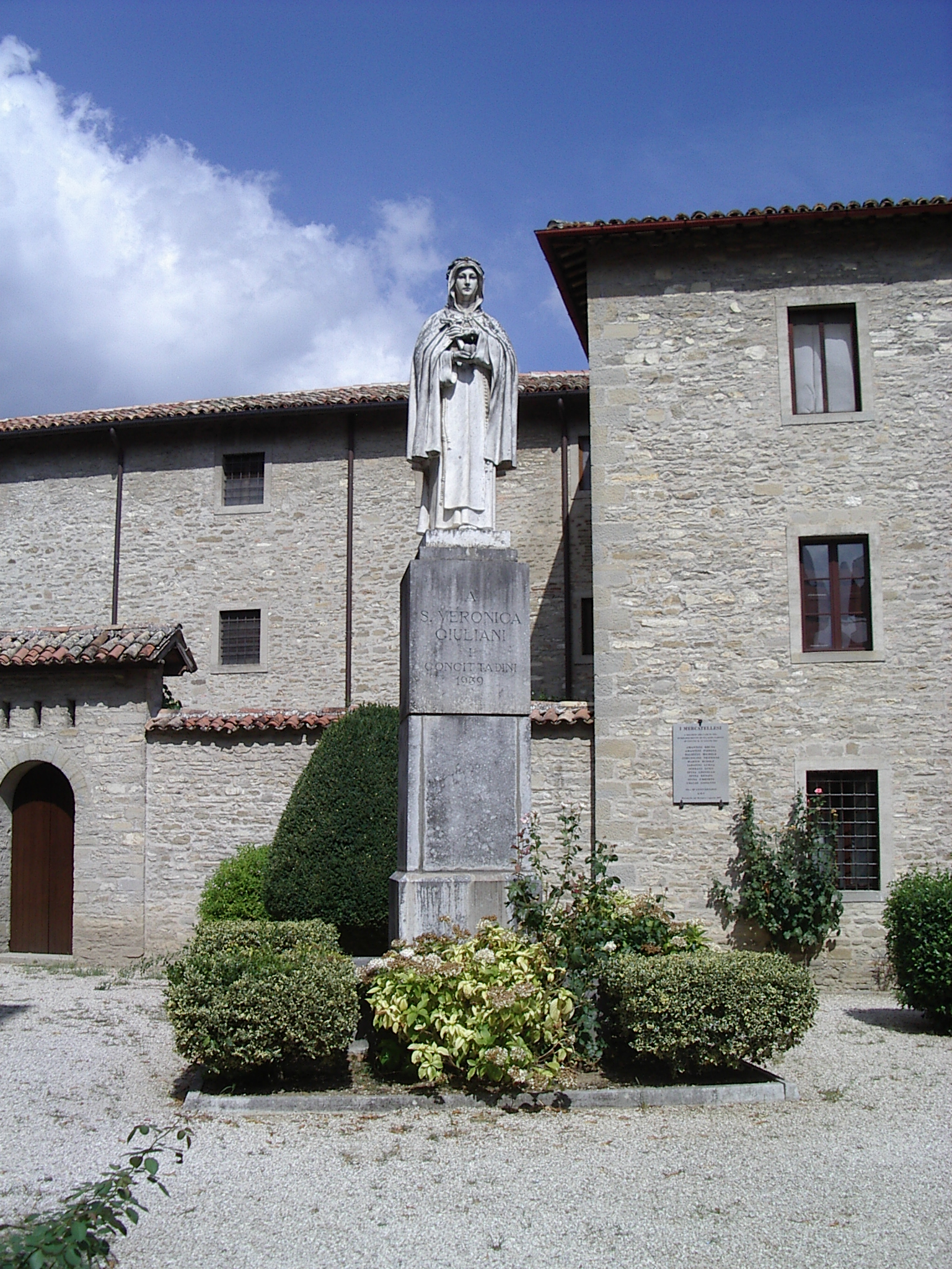 Veronique Giuliani statue à Mercatello sul Metauro, Marches, Italie